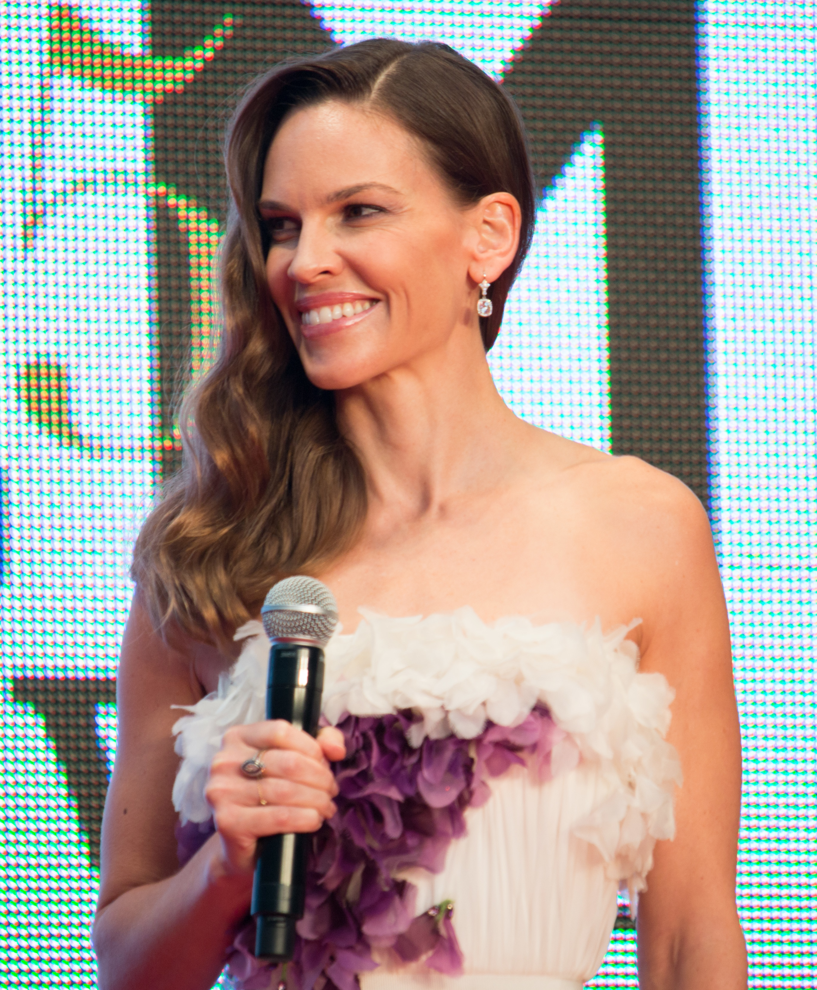 第28回 東京国際映画祭 オープニングセレモニー ヒラリー・スワンク (サヨナラの代わりに)